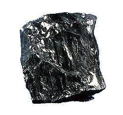 Antrasit